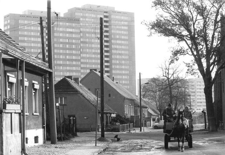 ADN-ZB-Zimmermann-22.7.85.- Berlin: Alt-Marzahn - Der Kern des ehemaligen märkischen Dorfes Marzahn entsteht nach historischen Vorbild neu. In keinen Häusern beiderseits des Dorfangers werden künftig Handwerksbetribe einzihen. Geplant sind eine Polsterei, eine Buchdruckwerkstadt, eine mechanische Werkstadt, ein Stukkateurbetrieb und eine Kurbelstrickerei. Die alte Dorfschmiede soll ausgebaut werden und als Kunst- und Hufschmiede arbeiten. - siehe dazu auch die Fotos 1985/0723/3, 5 u. 6 N